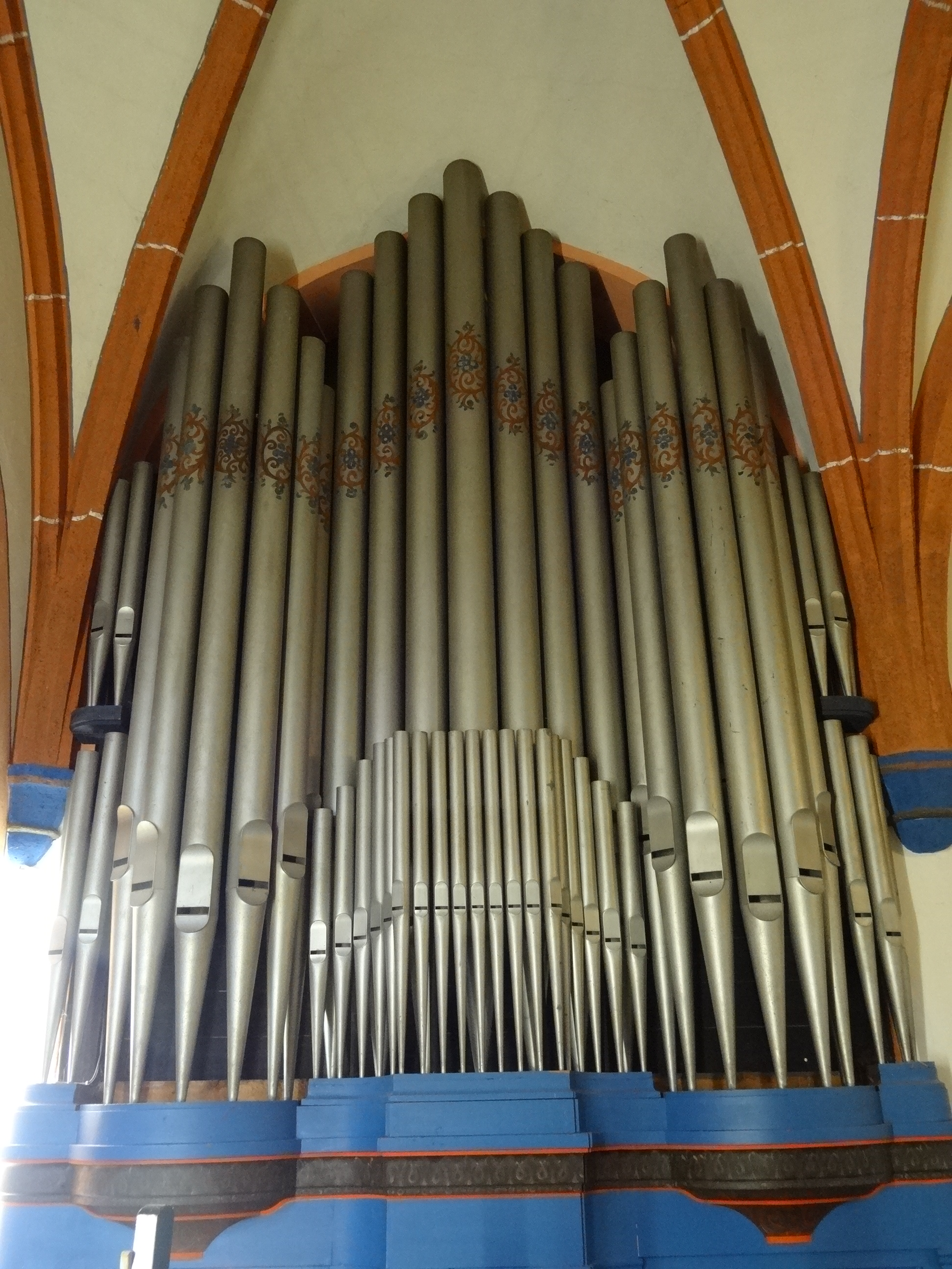 Evangelische Pfarrkirche (Schwickartshausen)